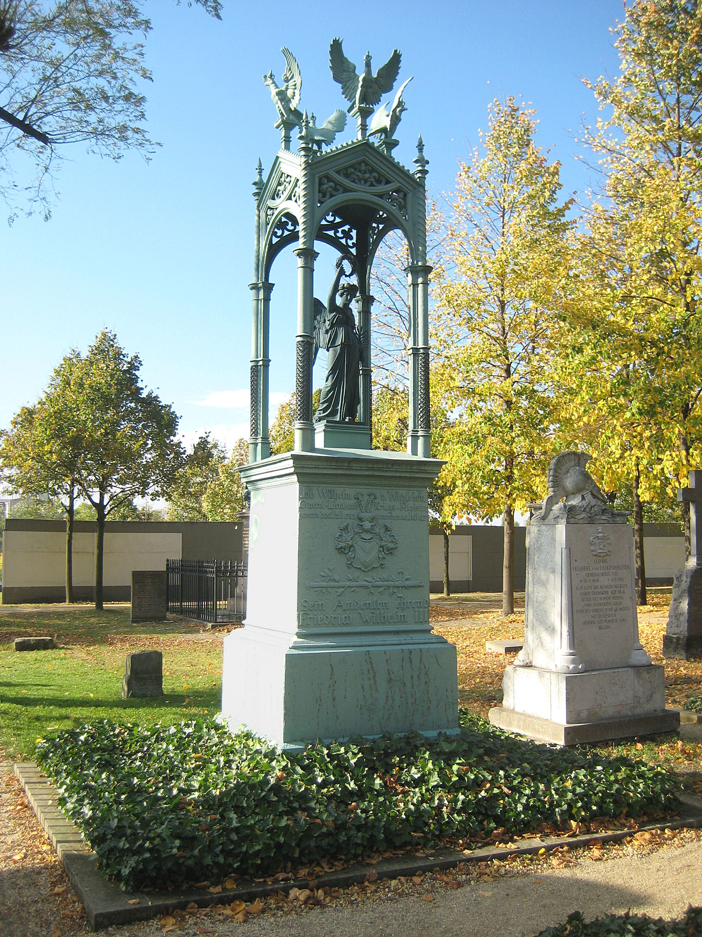 grave monument Job von Witzleben (1837) on Invalidenfriedhof cemetery in Berlin, designed by Karl Friedrich Schinkel